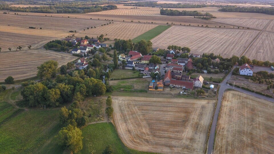 Juli 2018